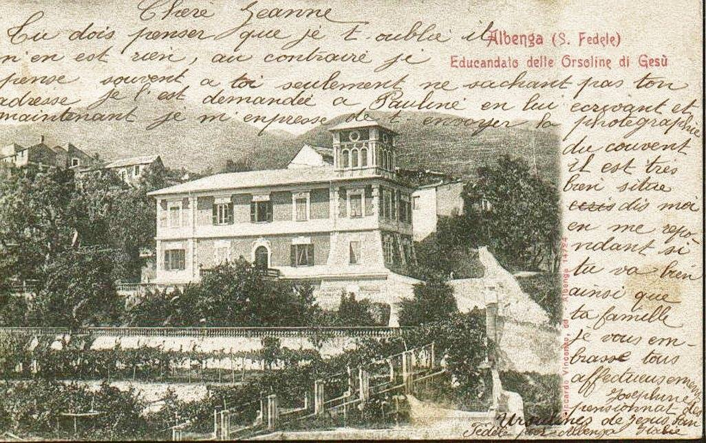 Questa cartolina rappresenta l'educando quando era ancora la Villa Borea Ricci, senza nessuna espansione, con la torretta laterale nello stile eclettico di metà ottocento. Il testo scritto è di una educanda che scrive alla famiglia in francese.